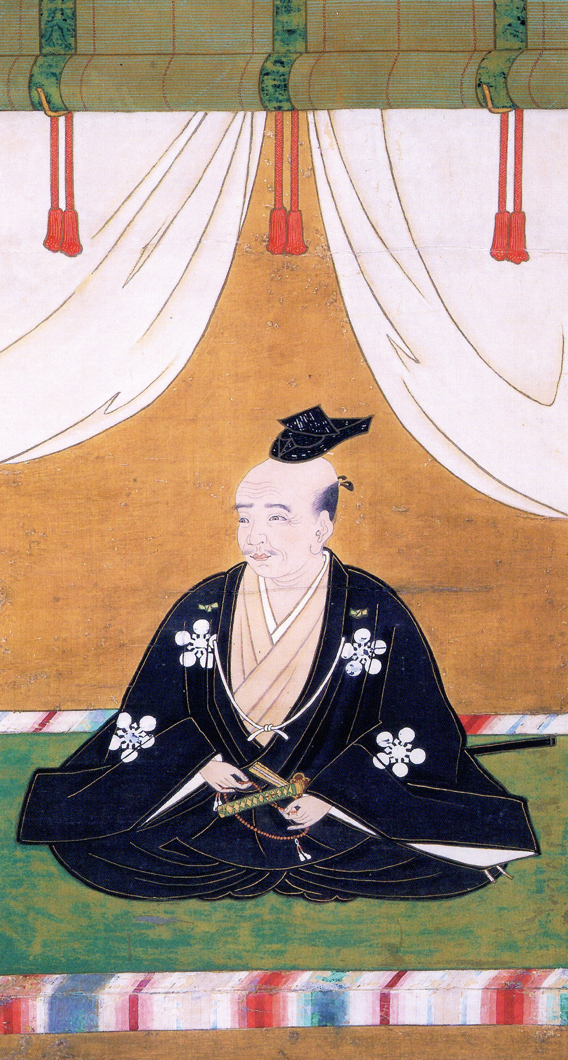 前田利政の肖像。